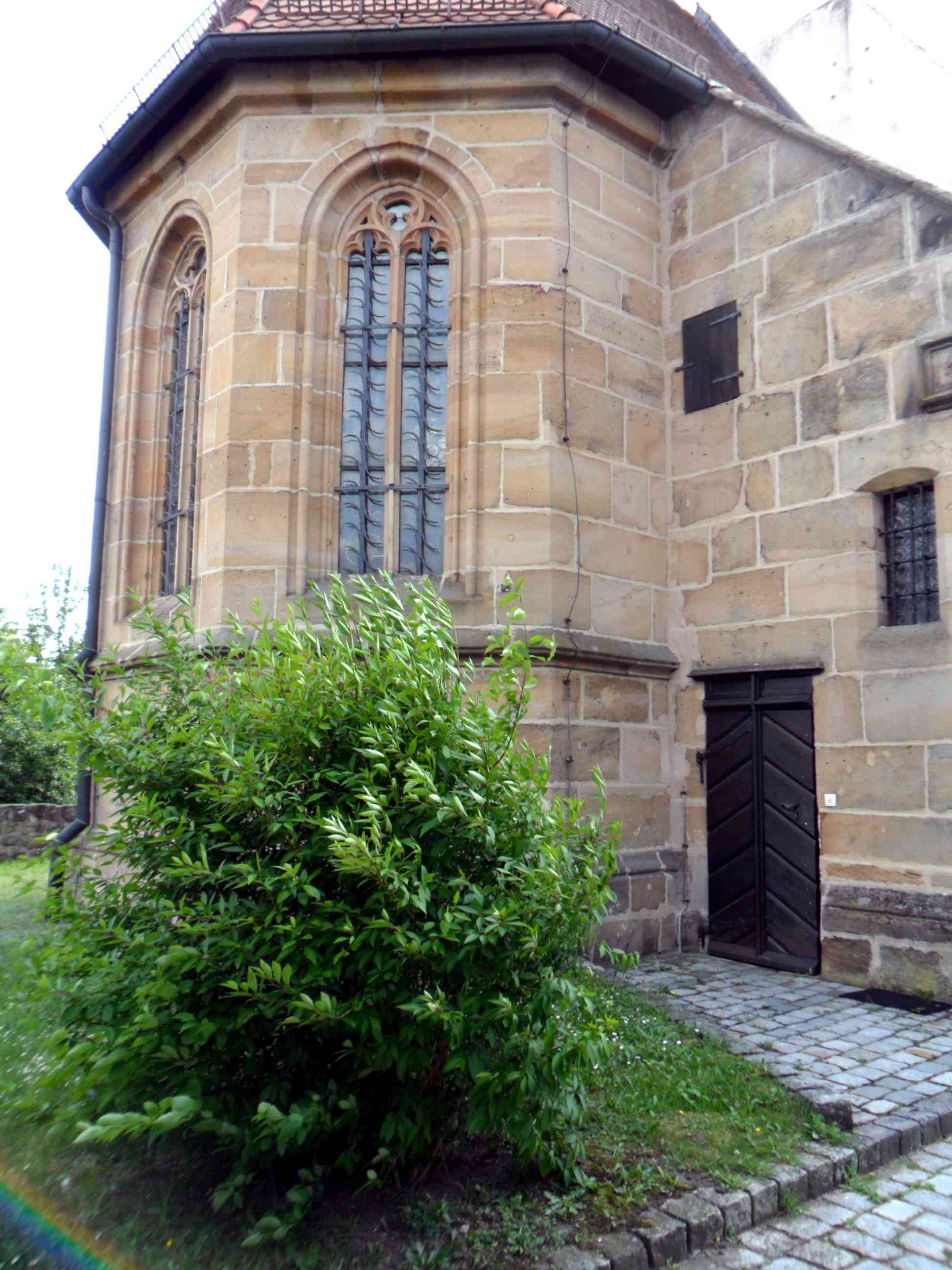 Puschendorf-Chor von Nordosten über Kirchhof-28052012